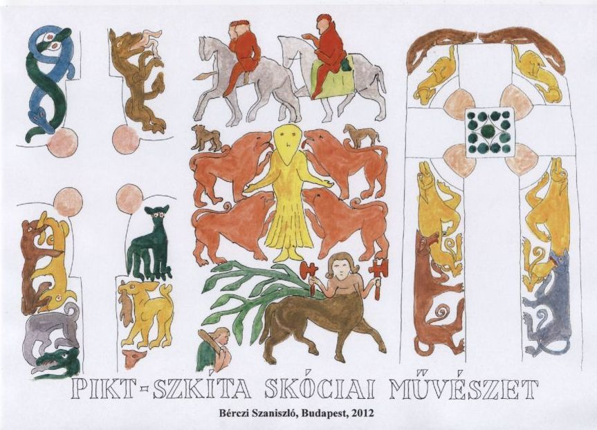 A pikt-szkíta füzeten három sírkő részlete látható